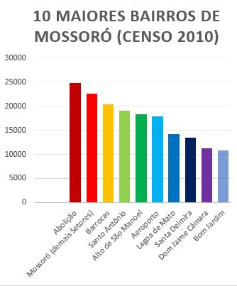 O gráfico mostra os 10 maiores bairros de Mossoró.